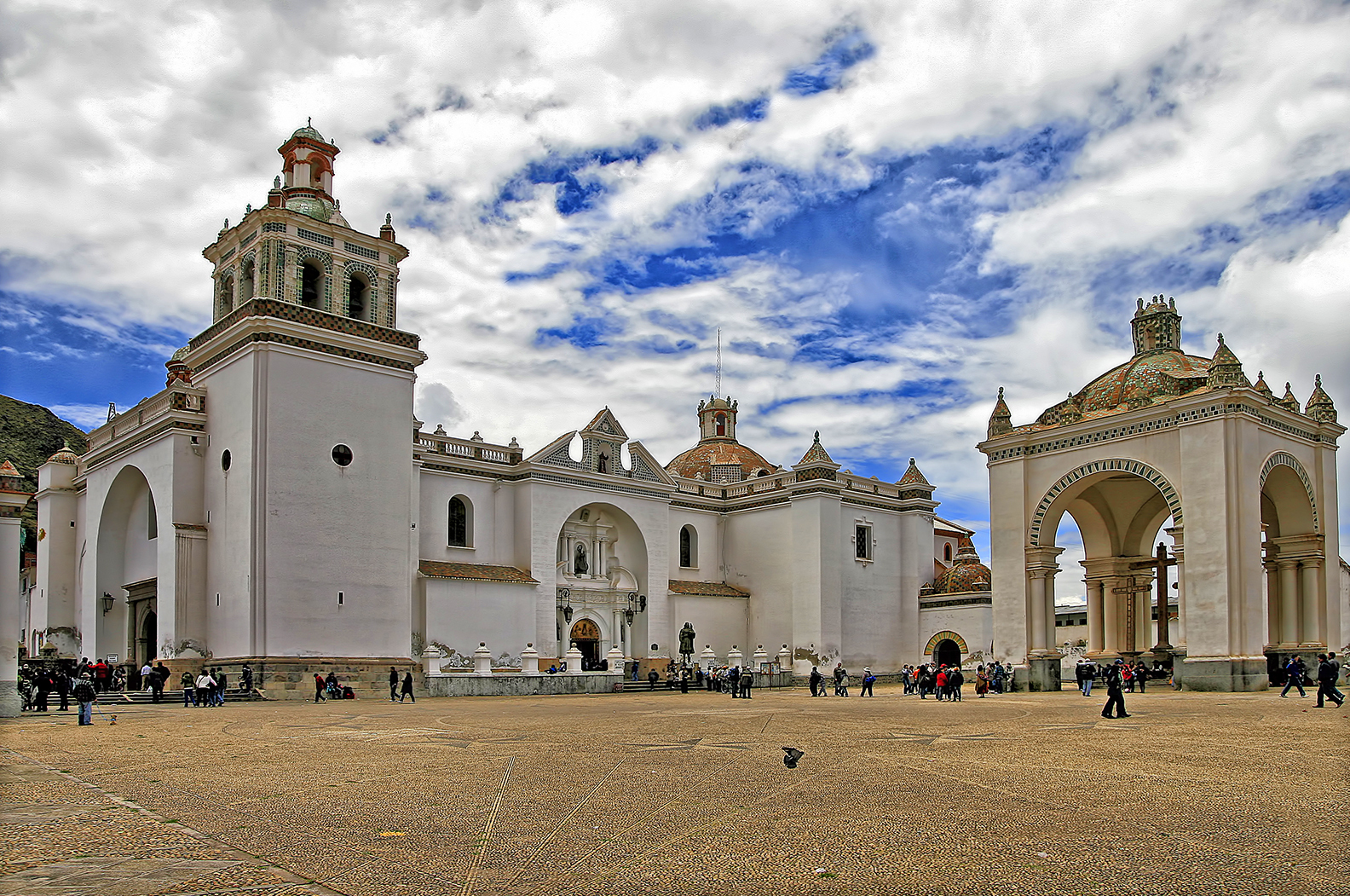 Construído entre los años 1601 y 1619 por el Arq. Francisco Jiménez de Siguenza.